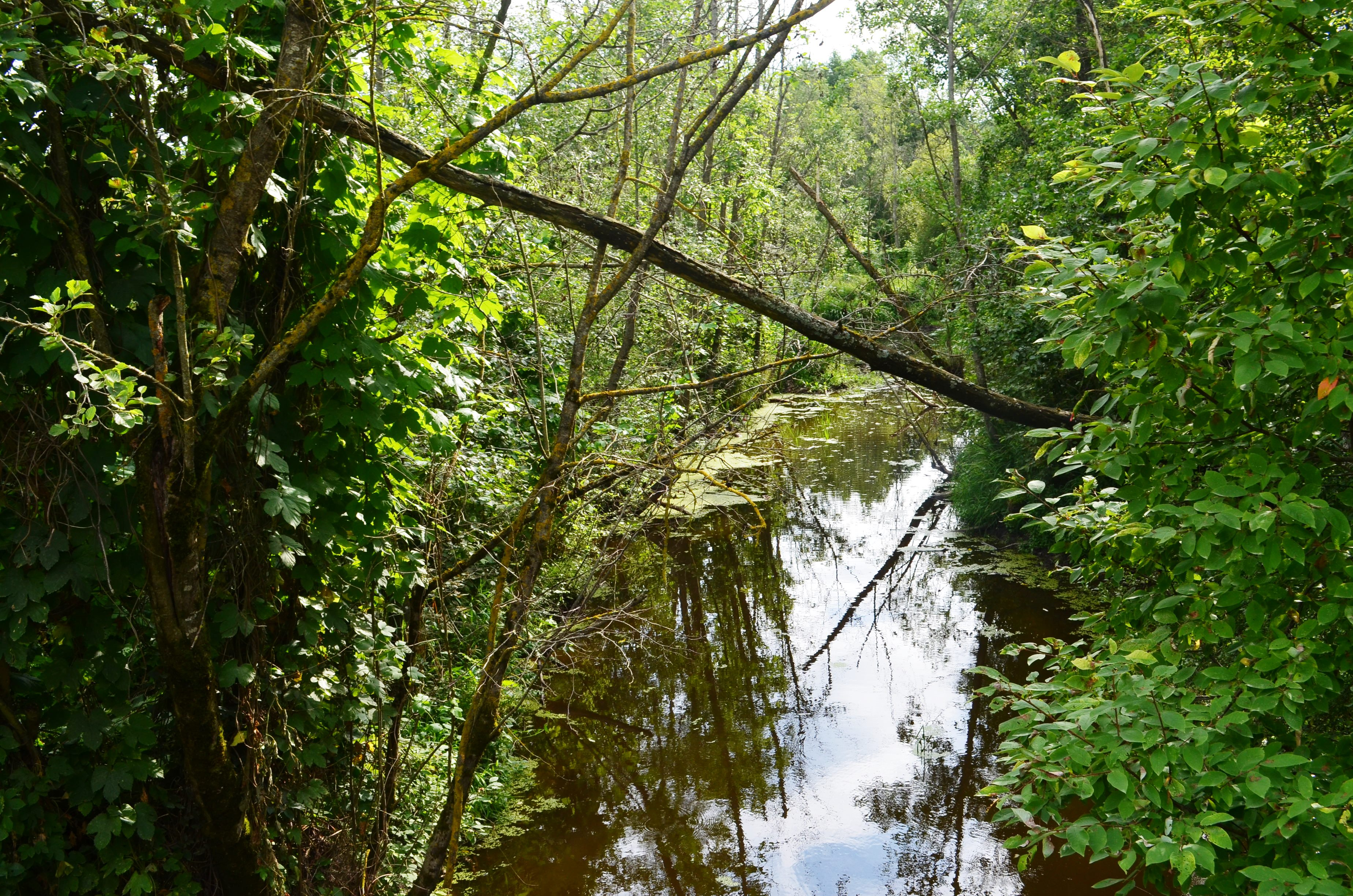 Smilgos upė tarp Lipliūnų ir Stasiūnų, Kėdainių r.